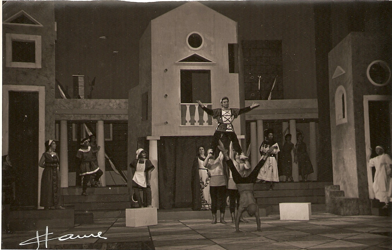 En el Tratro Nacional Cervantes durante la representación de Los Mellizos de Plauto